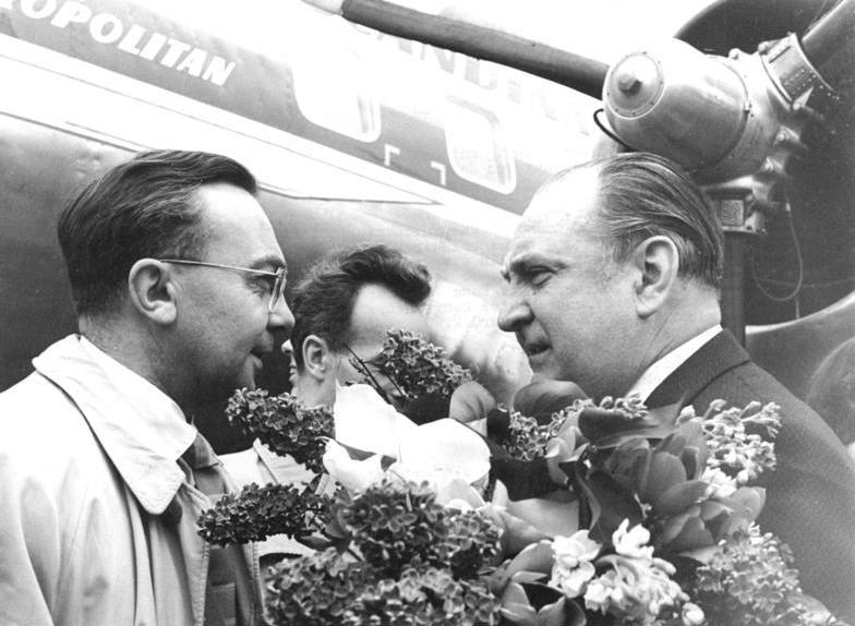 Zentralbild-Stöhr Tro-Le 7.5.1961 Gewandhausorchester Leipzig mit seinem Leiter Prof. Franz Konwitschny von Japan-Tournee zurück Am 7.5.1961 traf das Gewandhausorchester Leipzig unter seinem Leiter Generalmusikdirektor Prof. Franz Konwitschny wieder in Berlin ein. Zur Begrüßung hatte sich u.a. der Stellvertreter, Minister für Kultur, Prof. Hans Pischner eingefunden. Das Gewandhausorchester kehrte von einer 4-wöchigen Tournee aus Japan zurück. UBz: Prof. Hans Pischner begrüßt Prof. Franz Konwitschny auf dem Flughafen Berlin-Schönefeld.